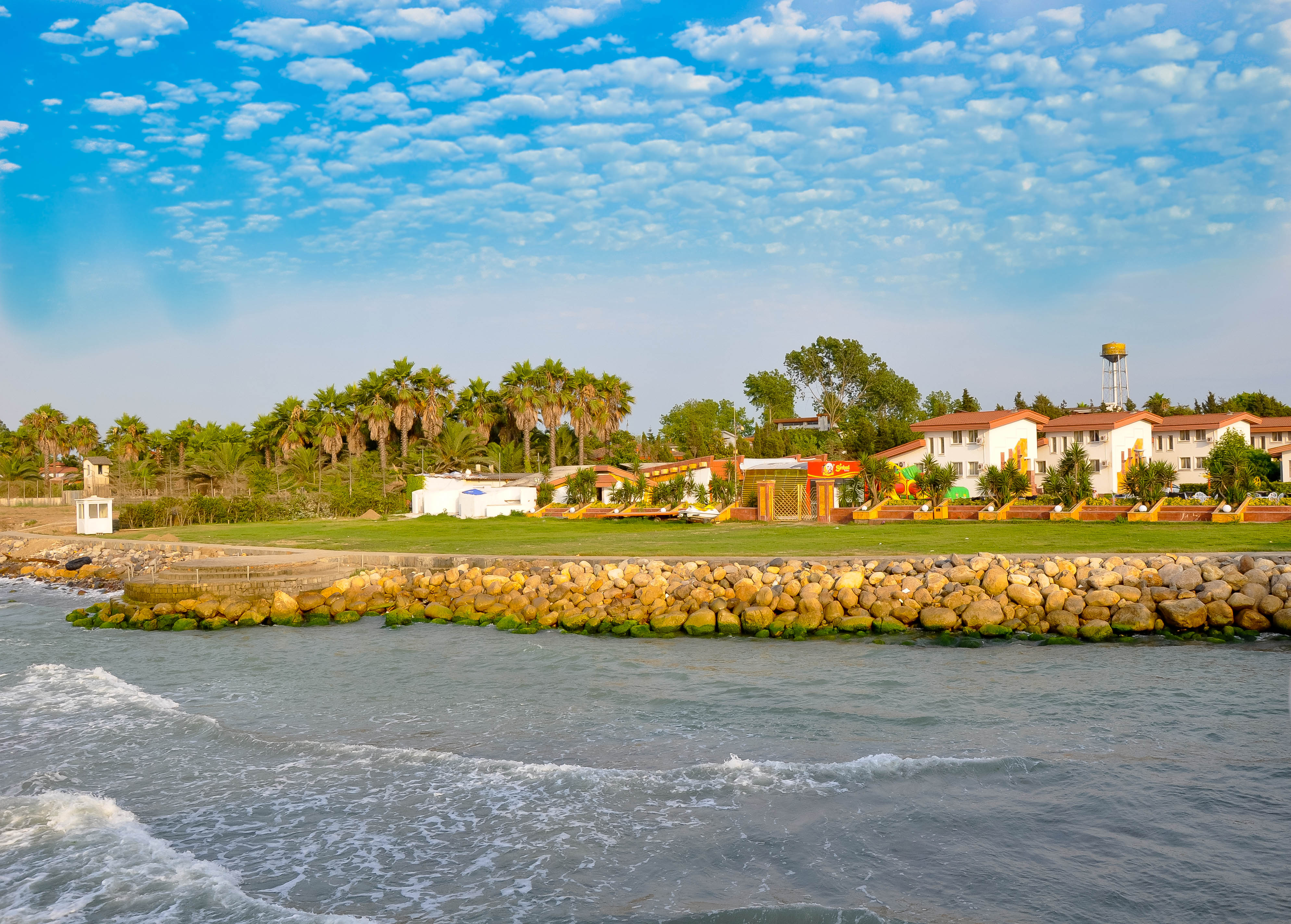 Mazandaran Coast